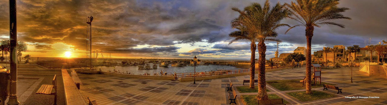 Fotografia panoramica del porto di Scoglitti nel tardo pomeriggio del 25 Dicembre 2011